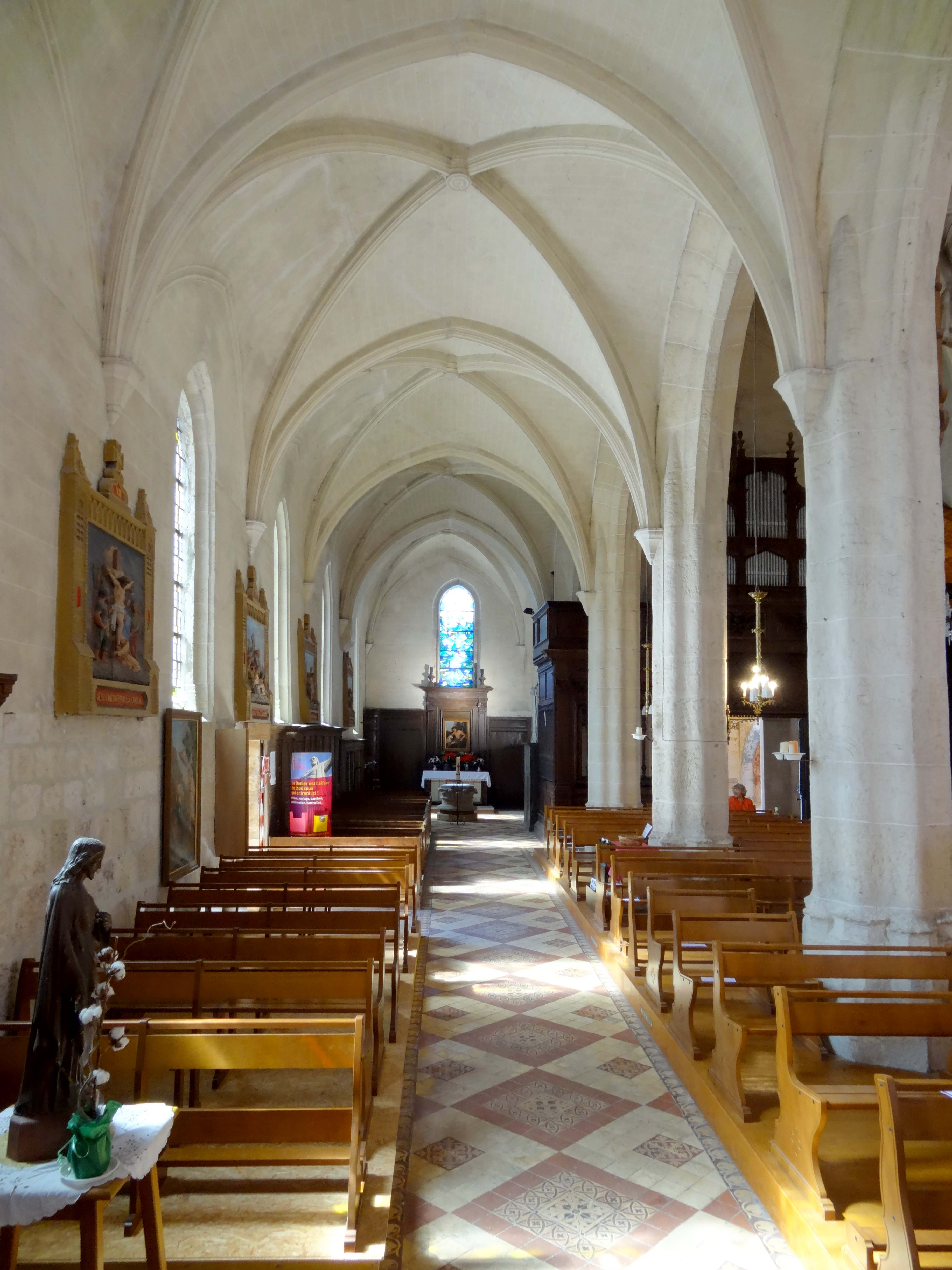 Intérieur de l'église - voir titre.